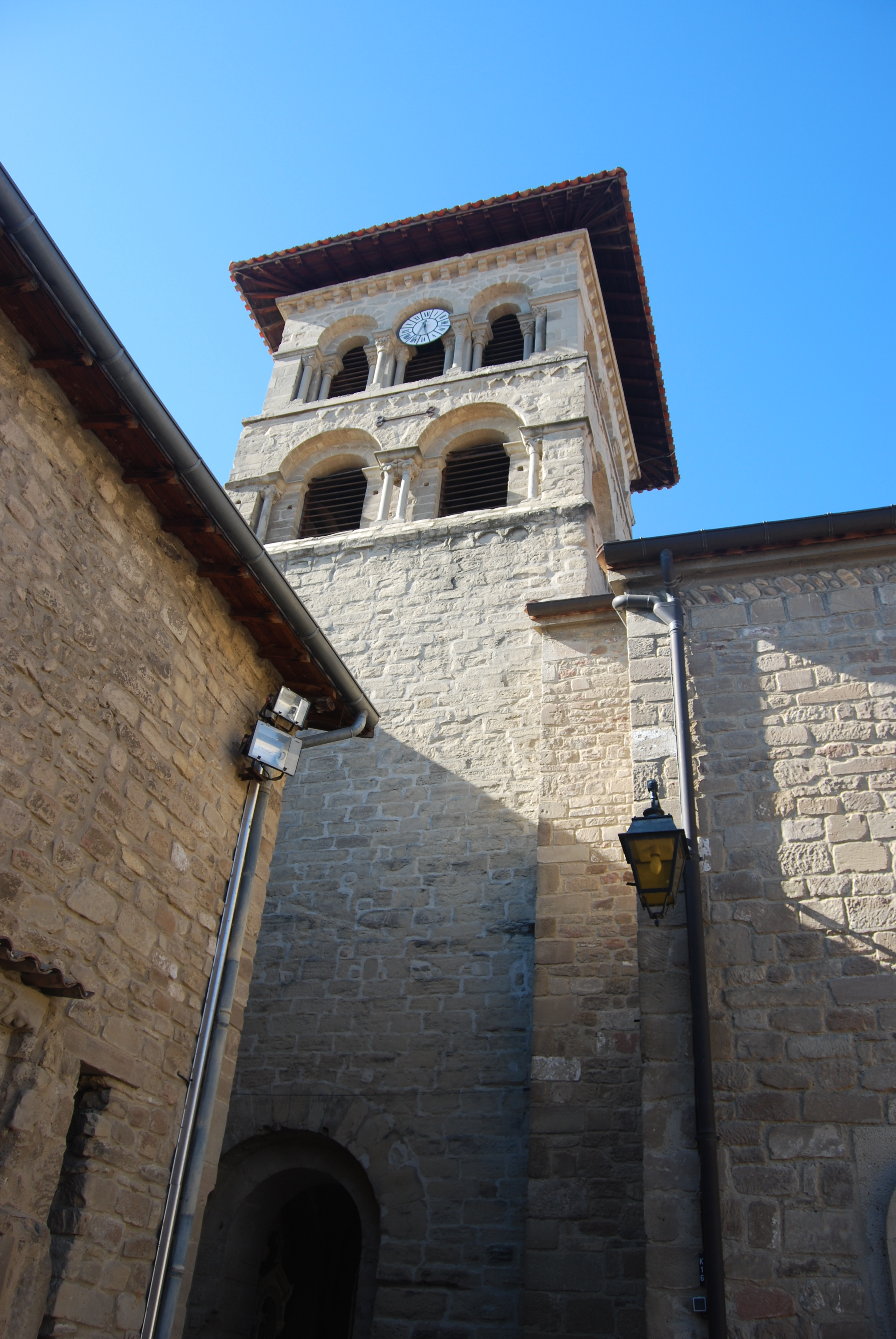 Le clocher de la collégiale de Saint-Donat-sur-l'Herbasse.